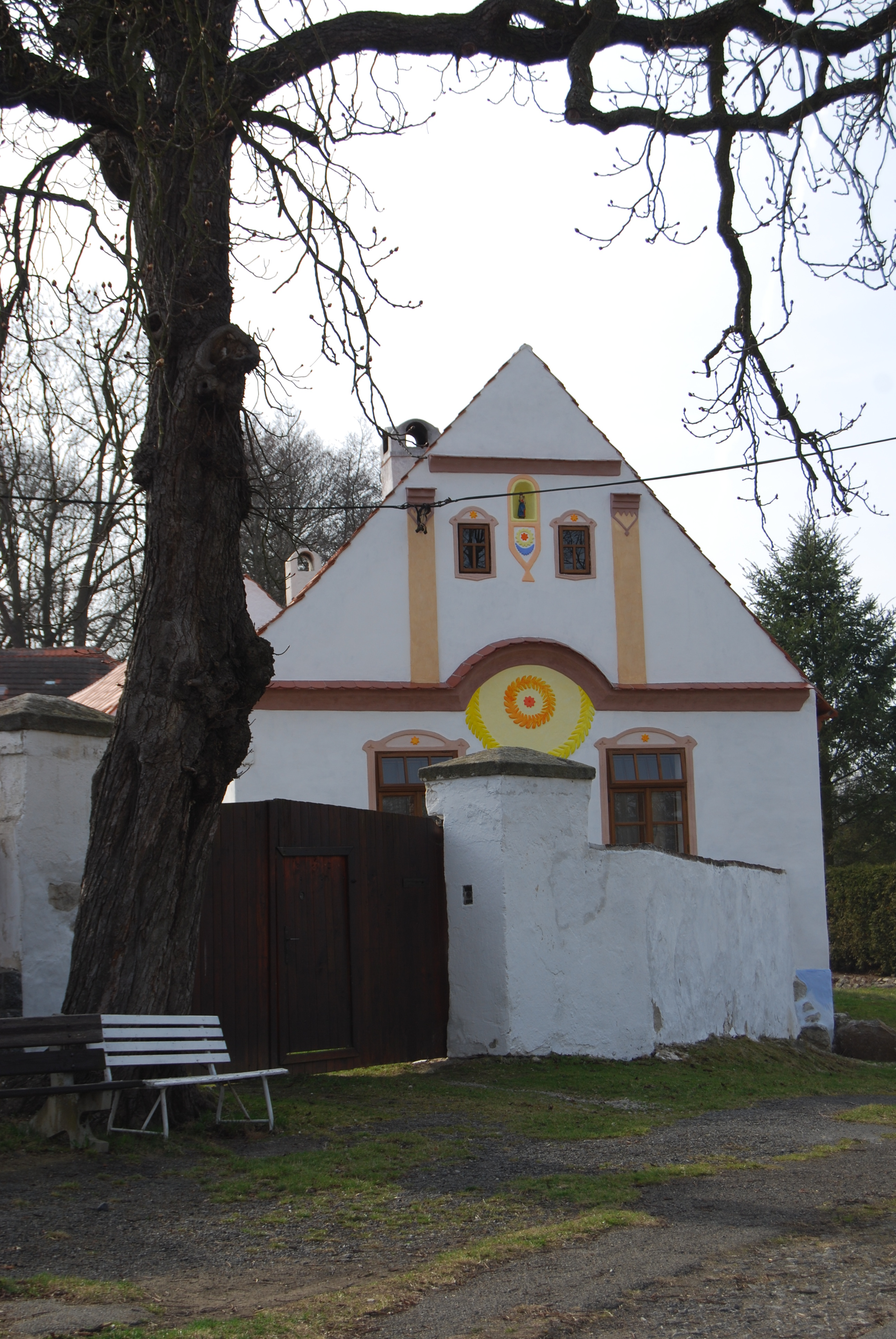 Usedlost čp. 8. v obci. Záhoří (okres Písek). Česká republika.